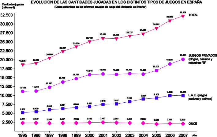 dinero jugado en distintos juegos en españa